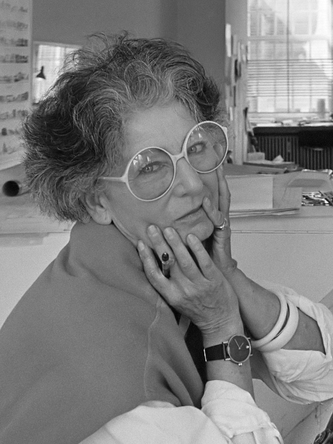 Architecte Luzia Hartsuyker-Curjel achter de tekentafel 2 juli 1987